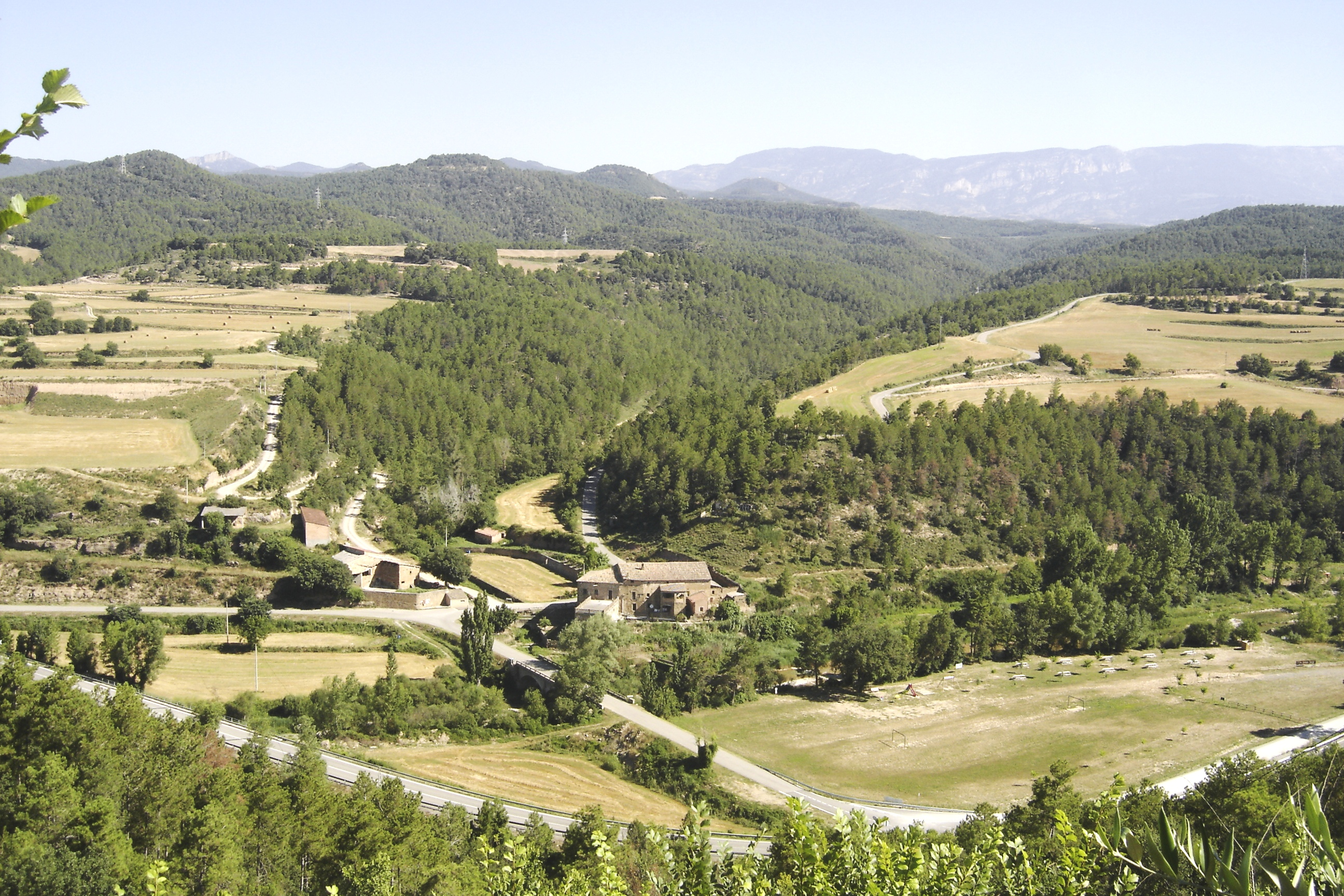 El barranc de Querol (al centre de la imatge, baixant en direcció NE-SW} abocant les seves aigües a la Ribera Salada (que baixa en direcció dreta -esquerra} al Molí de Querol. La carretera que surt de darrera el molí i puja serpentejant per entre els camps de la carena de la dreta és la carretera que va de Querol a Cambrils d'Odèn. La Carretera que es veu a la part inferior de la foto és la carretera de Solsona (cap a la dreta) a Bassella (cap a l'esquerra). La de damunt d'aquesta és l'anterior carretera que va quedar com un ramal d'accès a la carretera de Cambrils en construir-se un nou pont sobre la Ribera Salada. A la dreta d'aquest ramal antic, entre els arbres, s'hi pot veure un tercer pont, força més estret que els anteriors A la dreta de la carretera vella s'hi pot veure una àrea recreativa. A la carena de l'esquerra de la foto, el turó que es veu en primer terme és el Serrat de Santa Magdalena (734 m ) i el que hi ha a continuació és el Turó d'Ocata (764 m). La foto ha estat enregistrada des de la Masia de Ginestar.